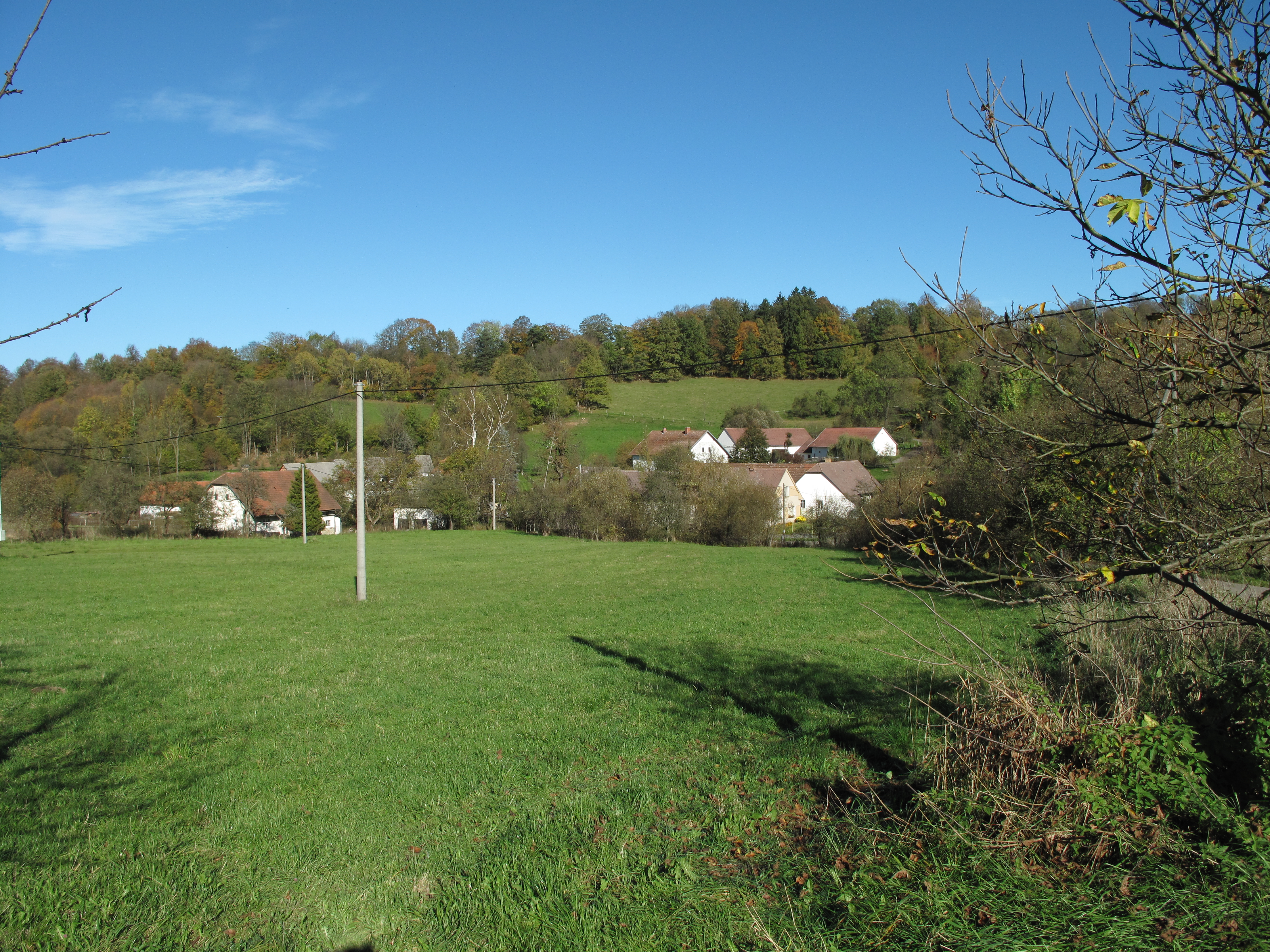 Pohled v Chválově. Okres Příbram, Česká republika.